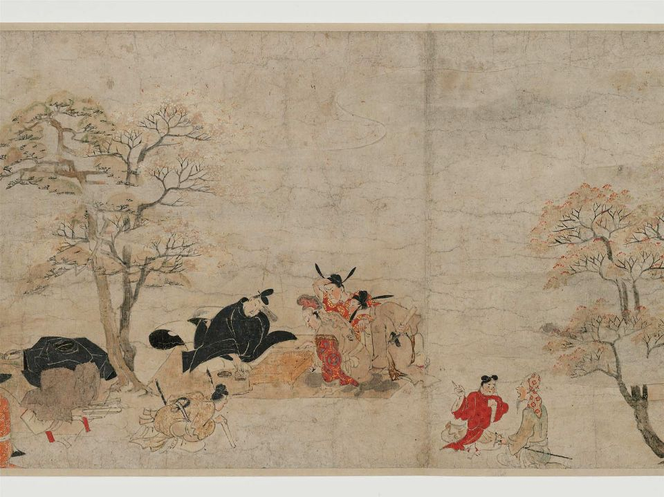 Rouleau 4, détail de la scène de la partie de go